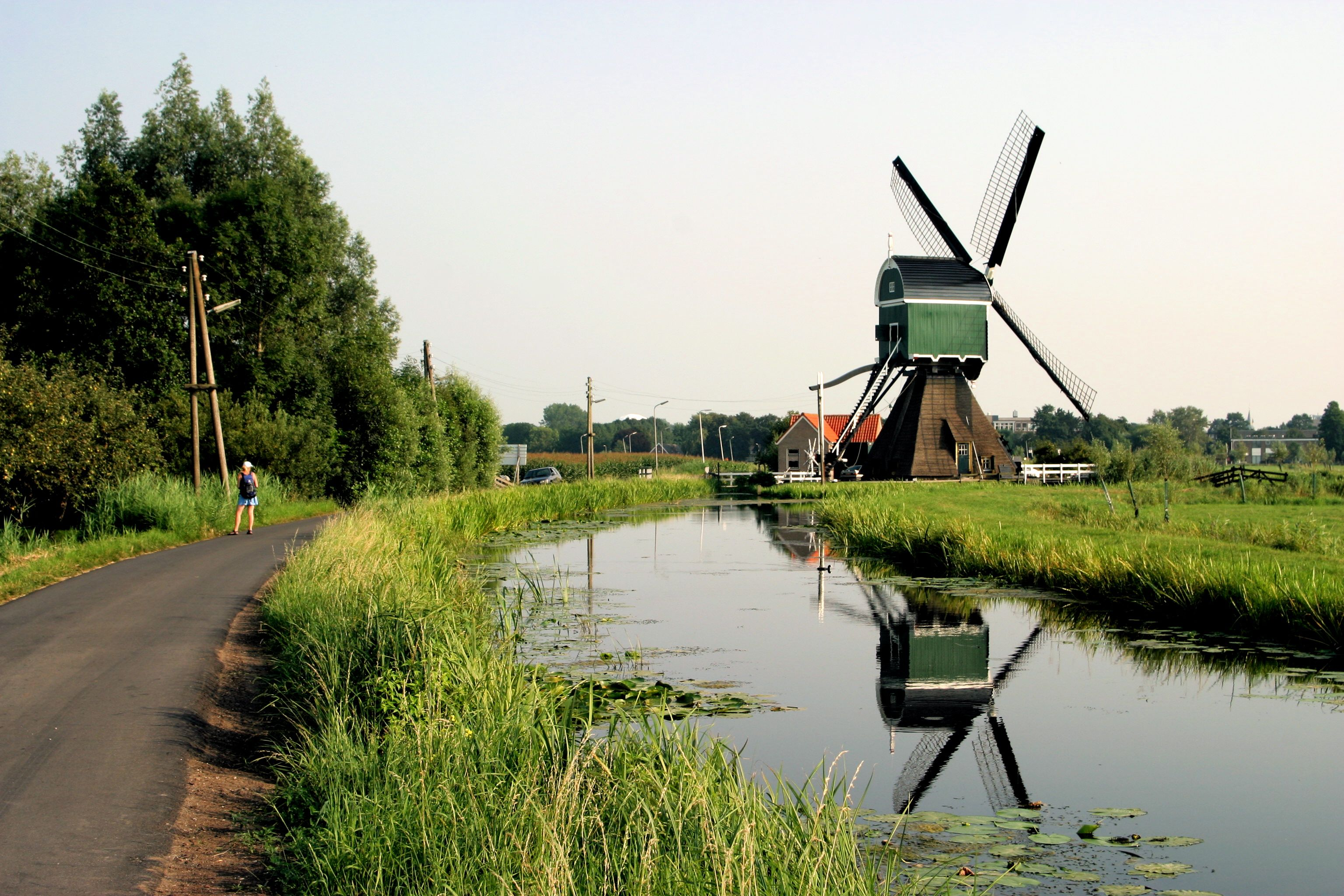 Molen langs de Vlist